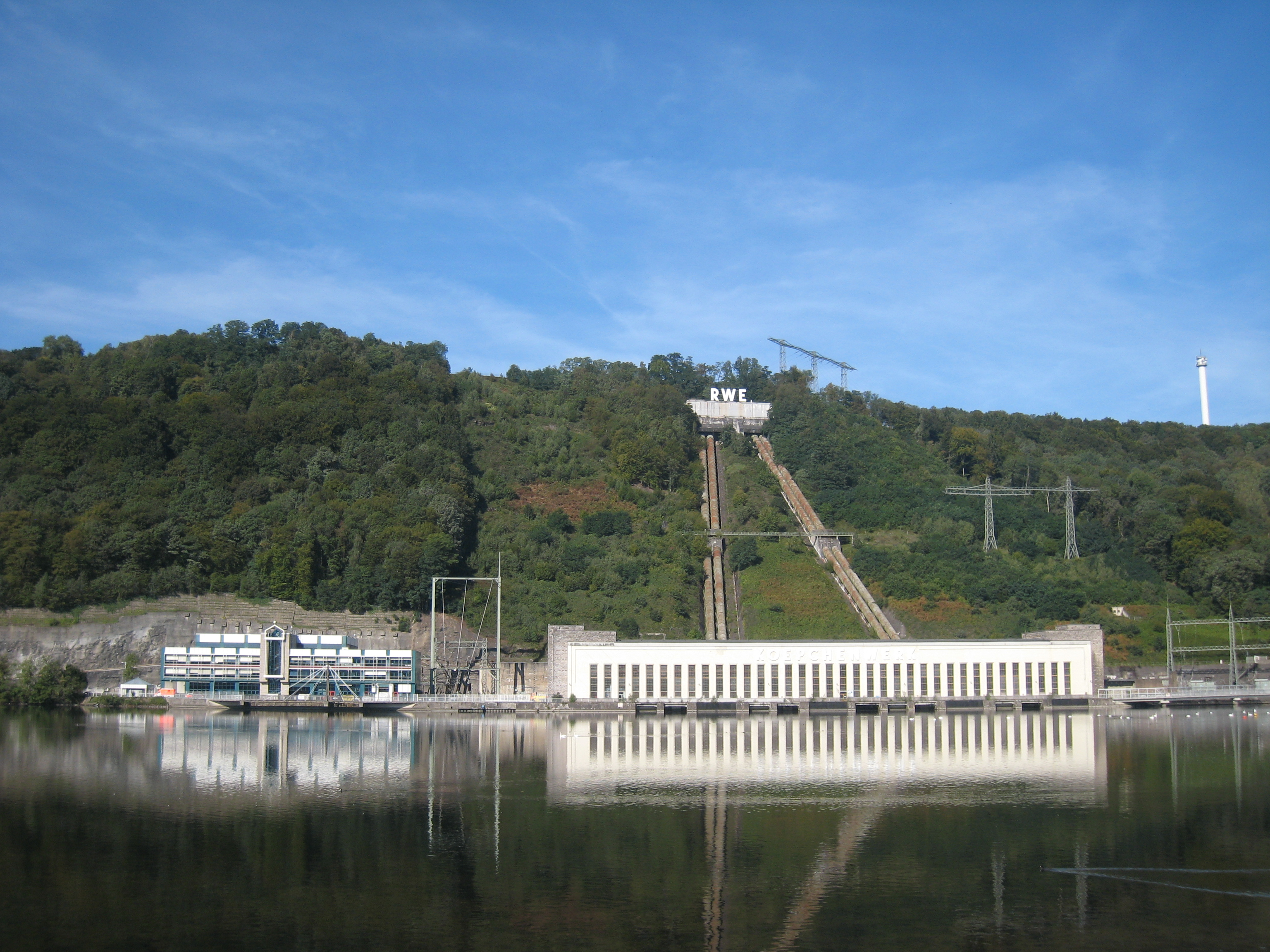 Pumpspeicherkraftwerk Koepchenwerk am Hengsteysee